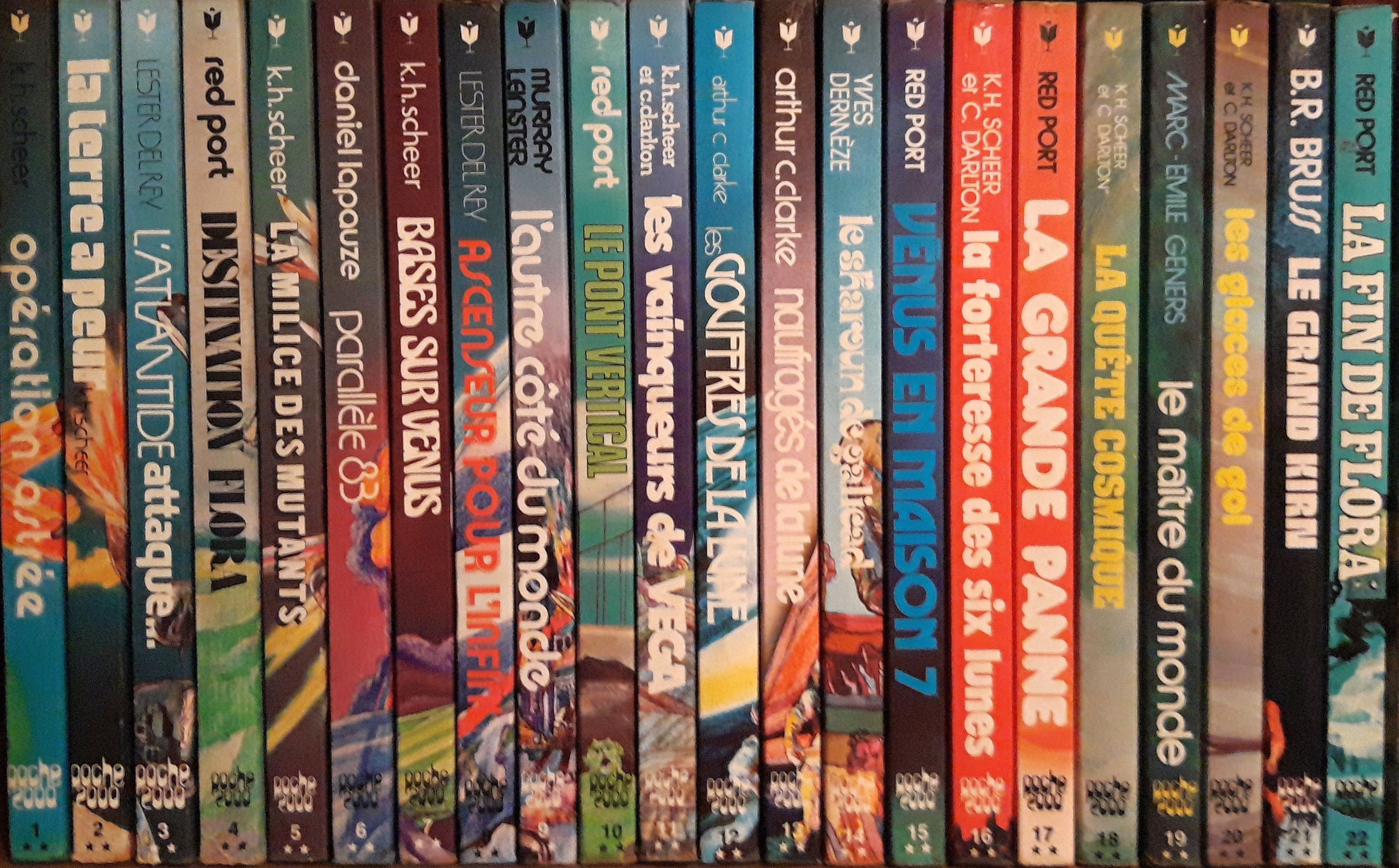 Coll. 'Poche 2000' Marabout, début années 70'.